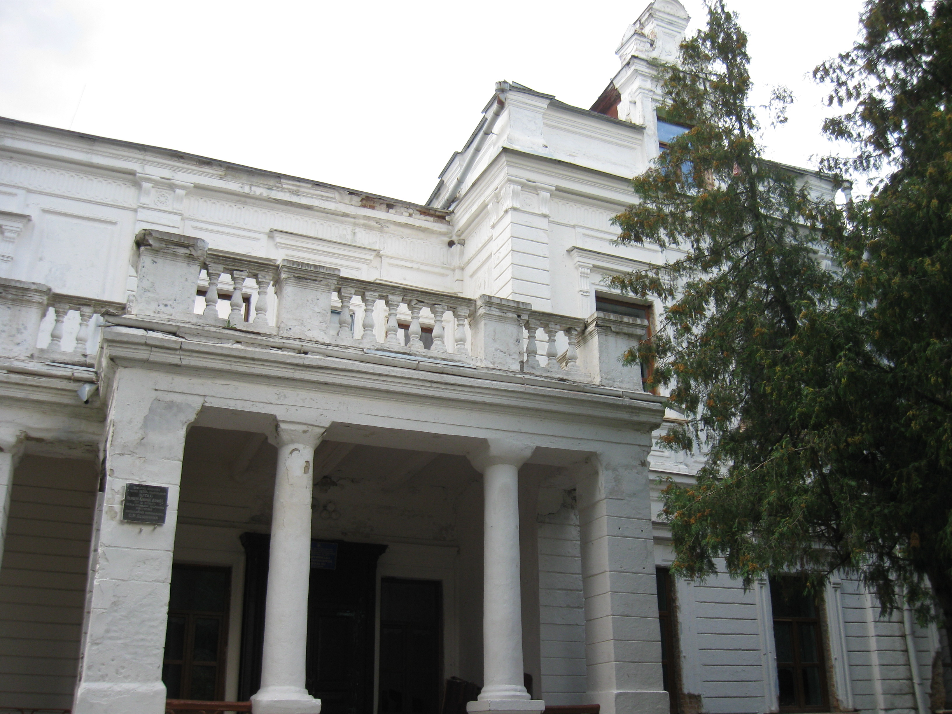 Андрушівський_палац_Терещенків_(8).jpg: Палац Терещенків у місті Андрушівці (райцентр Житомирської області), серпень 2010 року